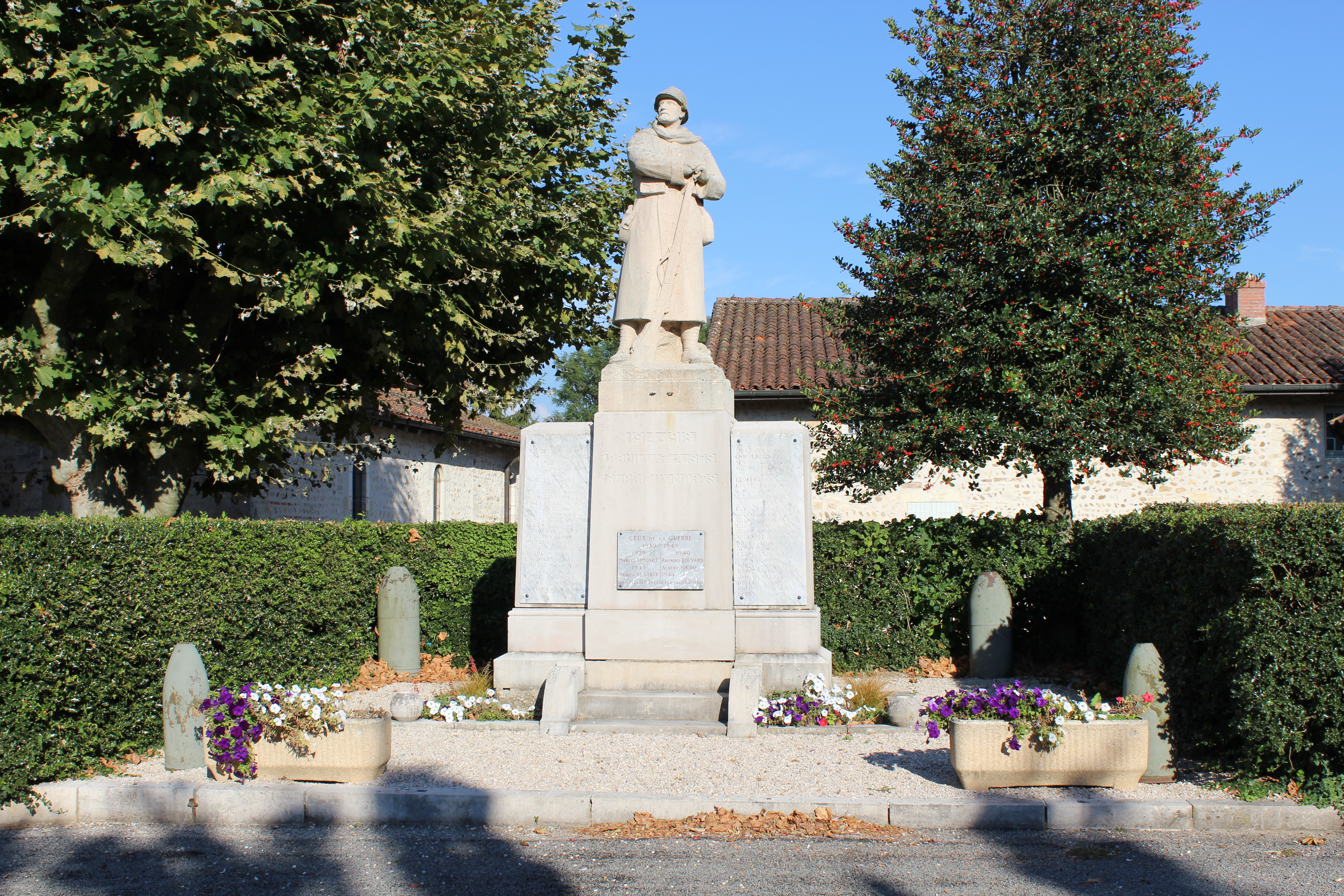 Monument aux morts de Druillat (Ain) mettant en scène un poilu.